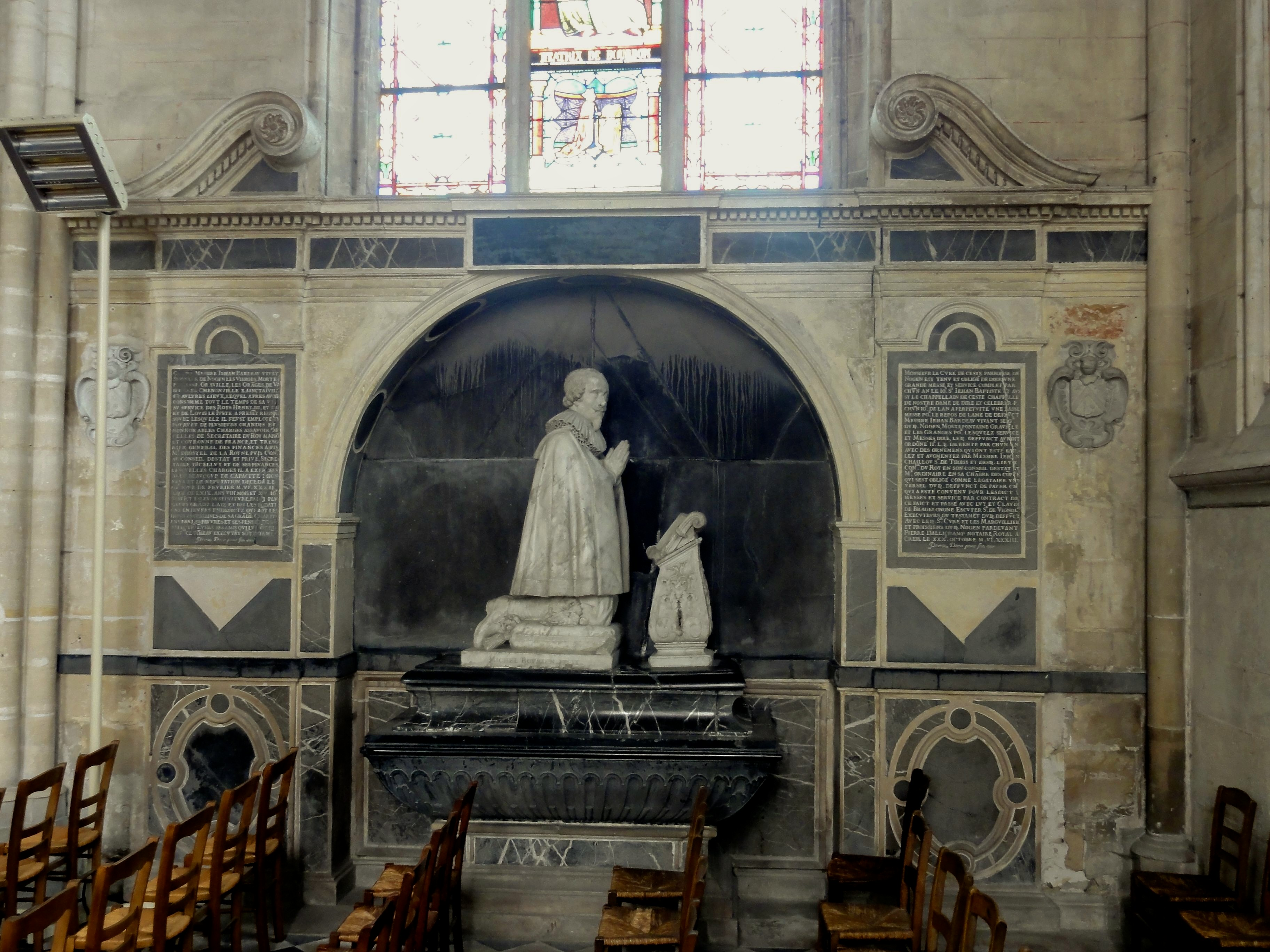 Monument funéraire de Jean Bardeau, mort en 1632.